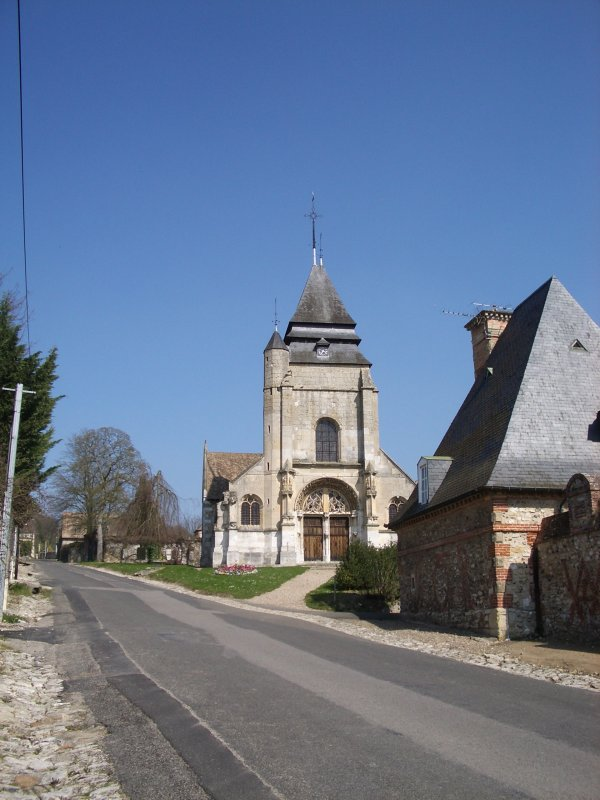 L'église de Ménilles